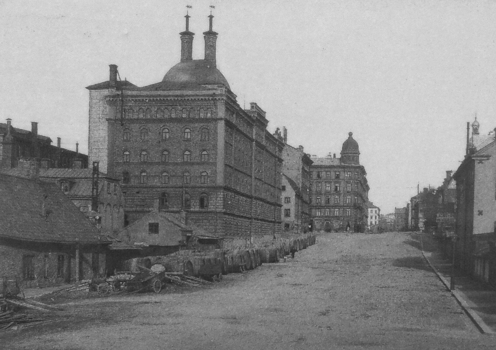 "S:t Eriks bryggerin:s" gamla byggnad på Kungsholmen i Stockholm år 1898